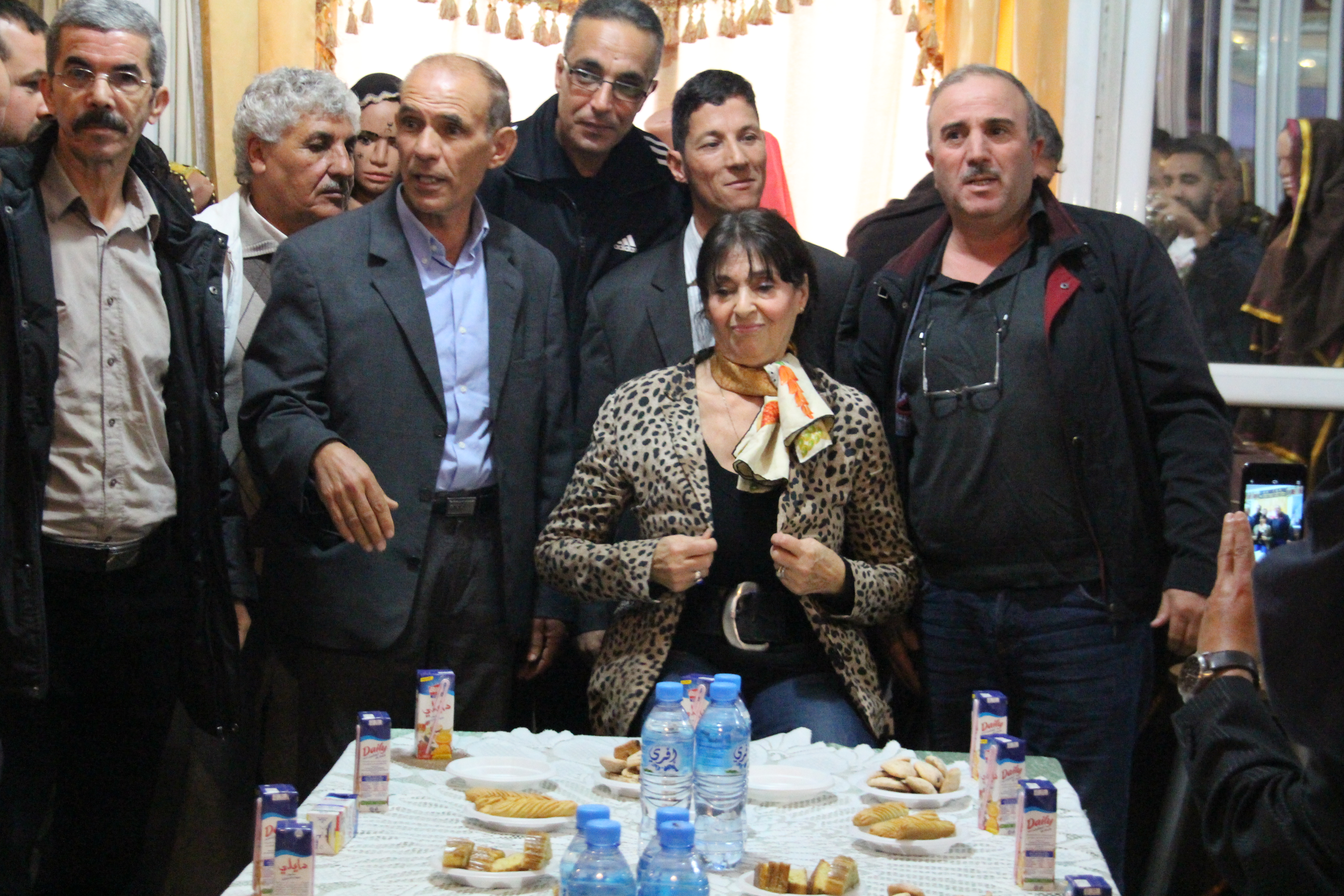 Markunda dans une cérémonie en hommage à elle Originaire de Merouana Belezma , interprète et écrivaine des Aurès, réside en France , photo prise lors de son hommage à Merouana , profession rare car il y a que trois femmes Dihya , elle et Massilia qui interprètaient des chansons du terroir musical chawi